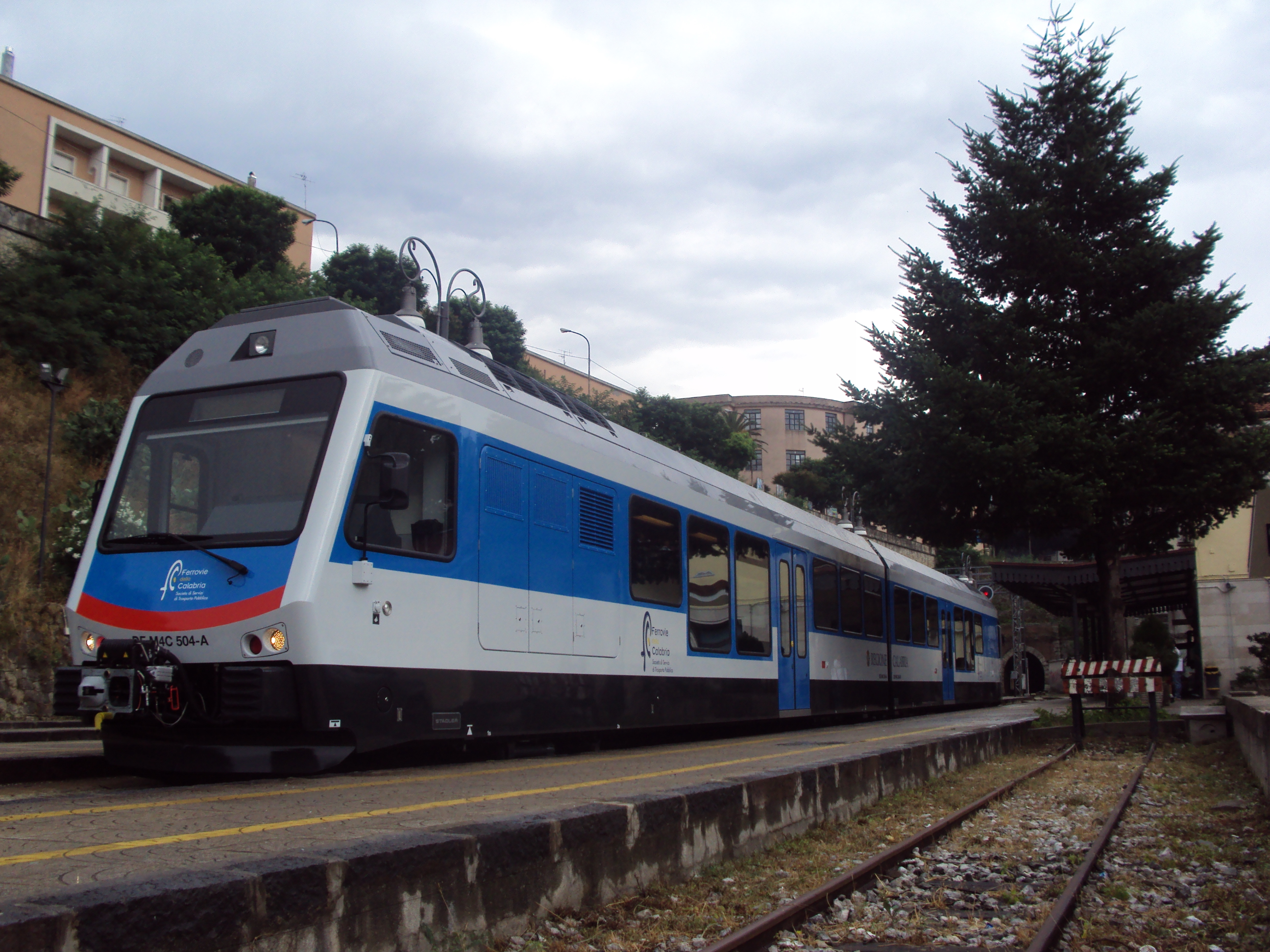 DE M4c.504 a Catanzaro Città